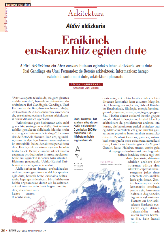 Aldiri aldizkari berria Argia aldizkarian (2010)